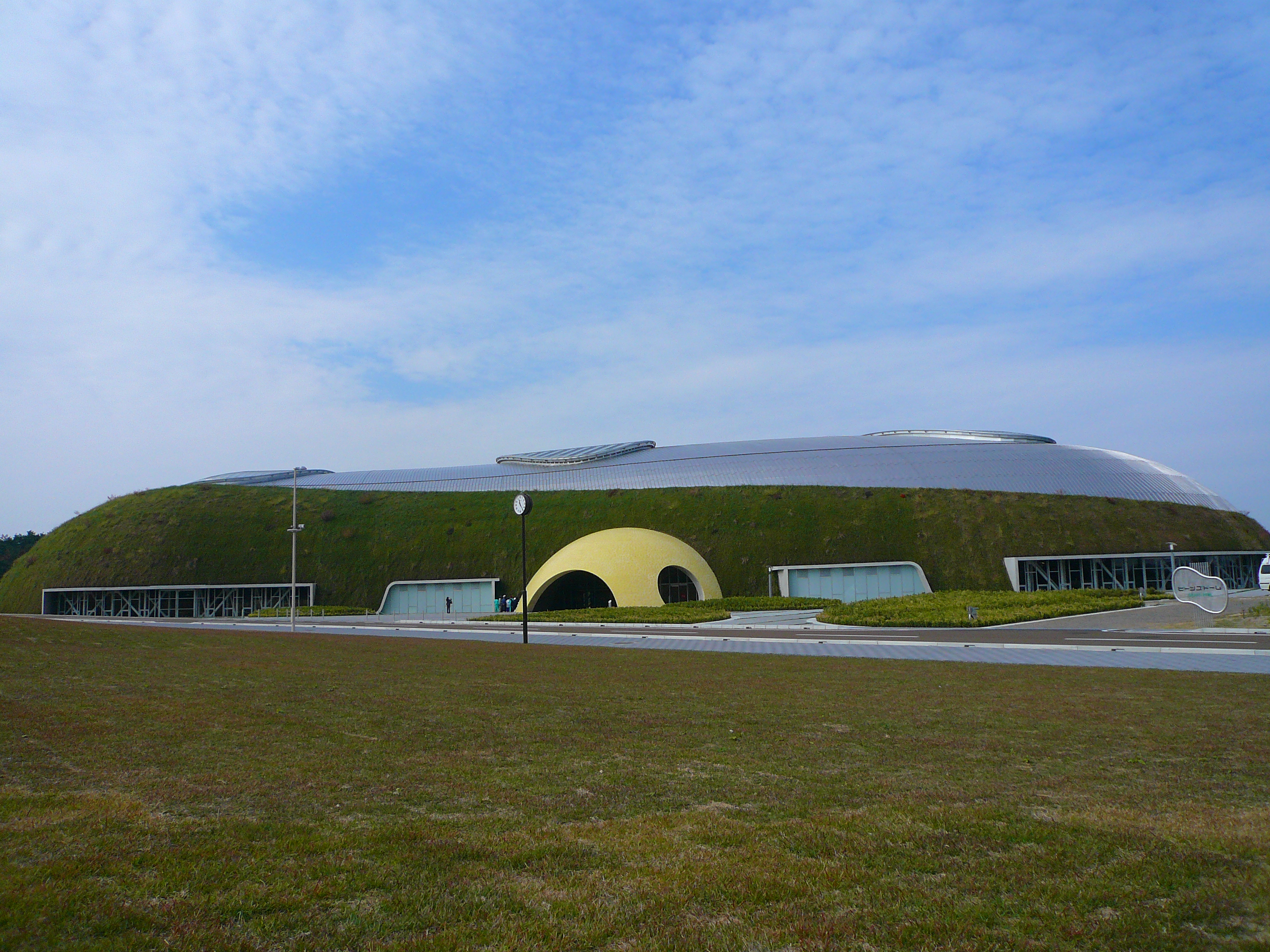 ビーンズドーム